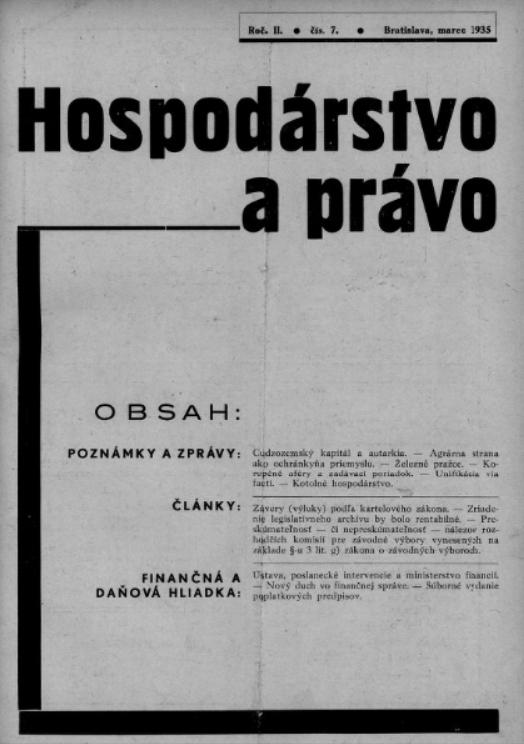 Titulný list mesačníka Hospodárstvo a právo.